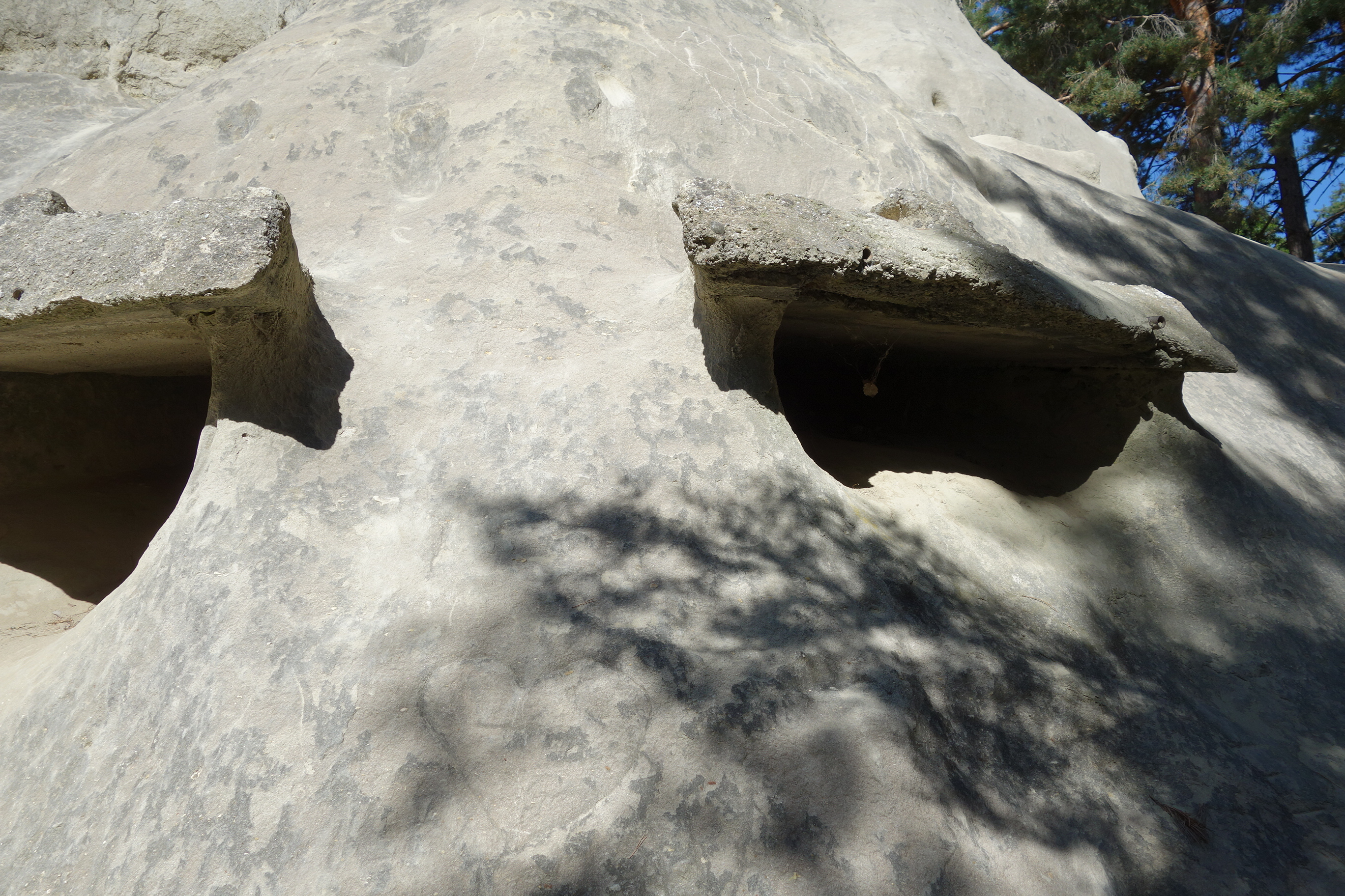 Infanteriewerk La Lamberta, Mont Vully, Schweiz